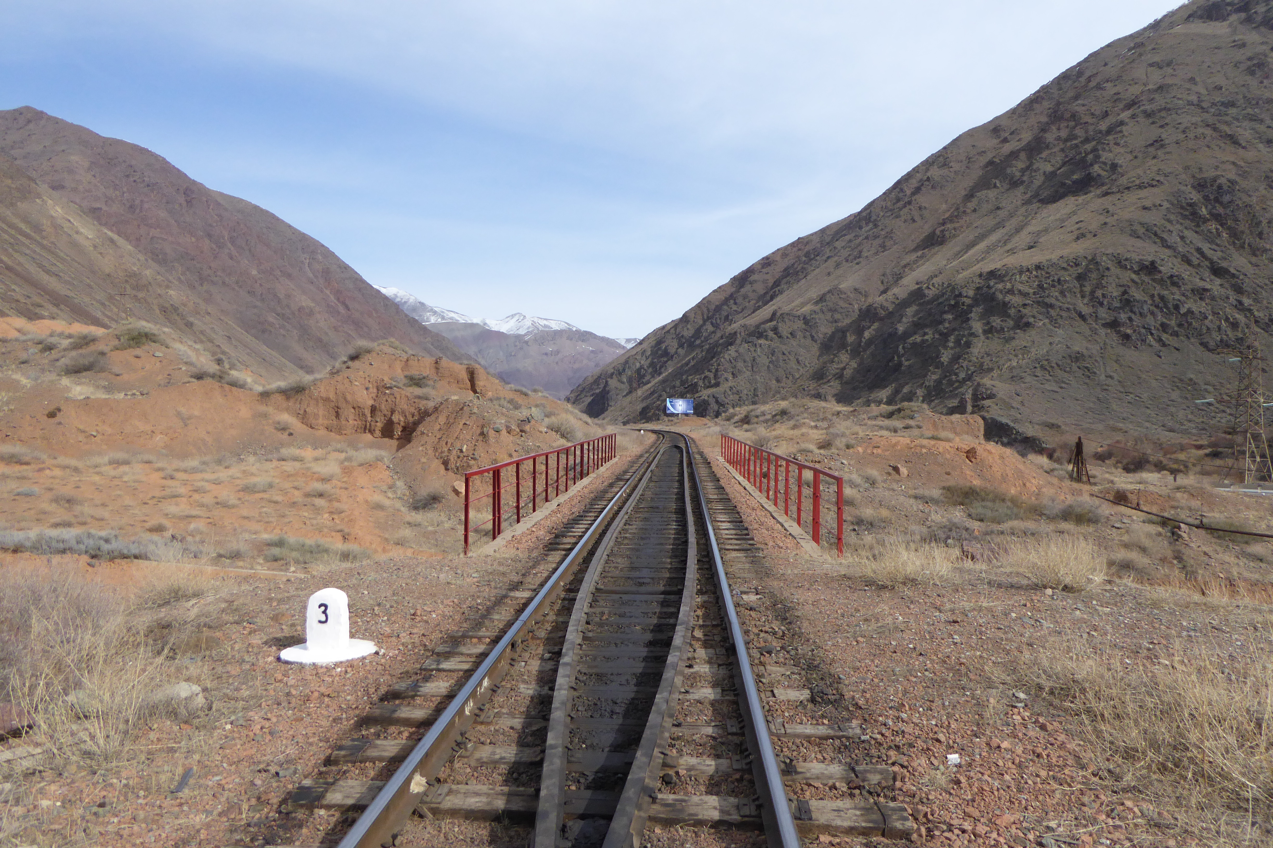 Bahnstrecke Bischkek-Balyktschy zwischen den Stationen Orlowka und Balyktschy, Kirgistan